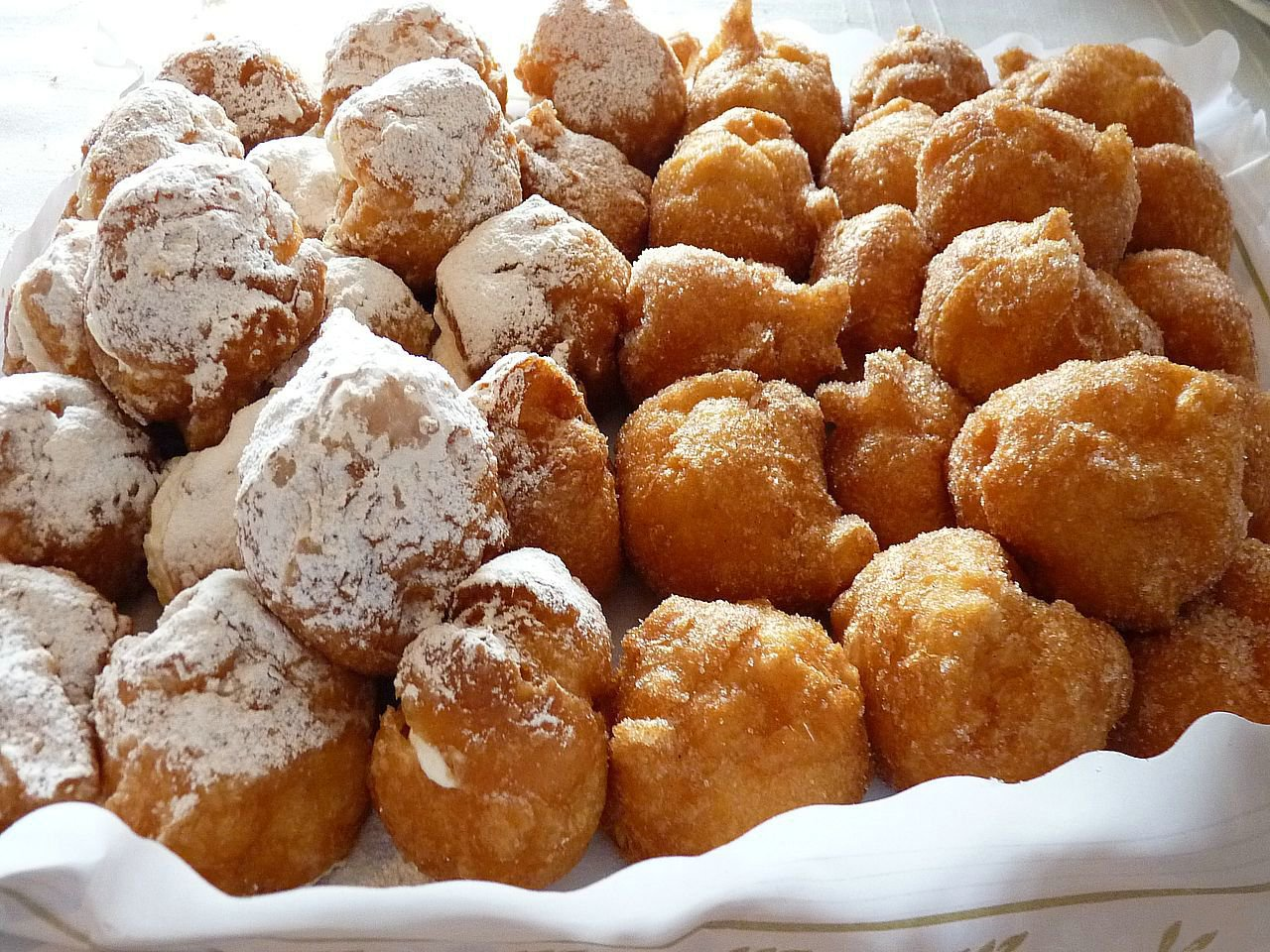 Unos buñuelos.